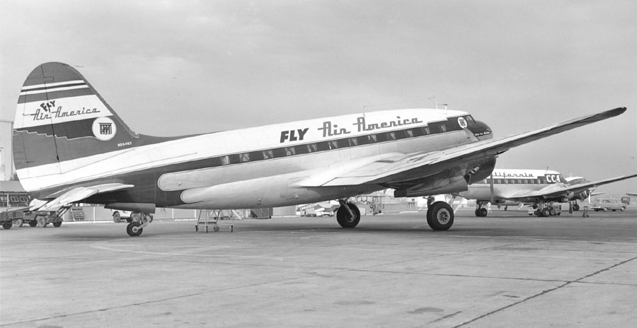 C-46E Air America Oakland 1952